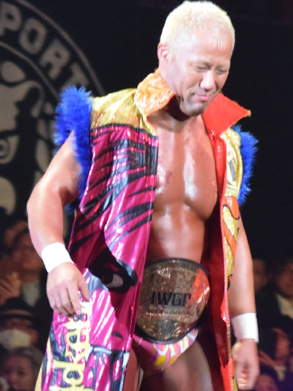 2016年2月11日 大阪府立体育会館 「THE NEW BEGINNING in OSAKA」 本間朋晃